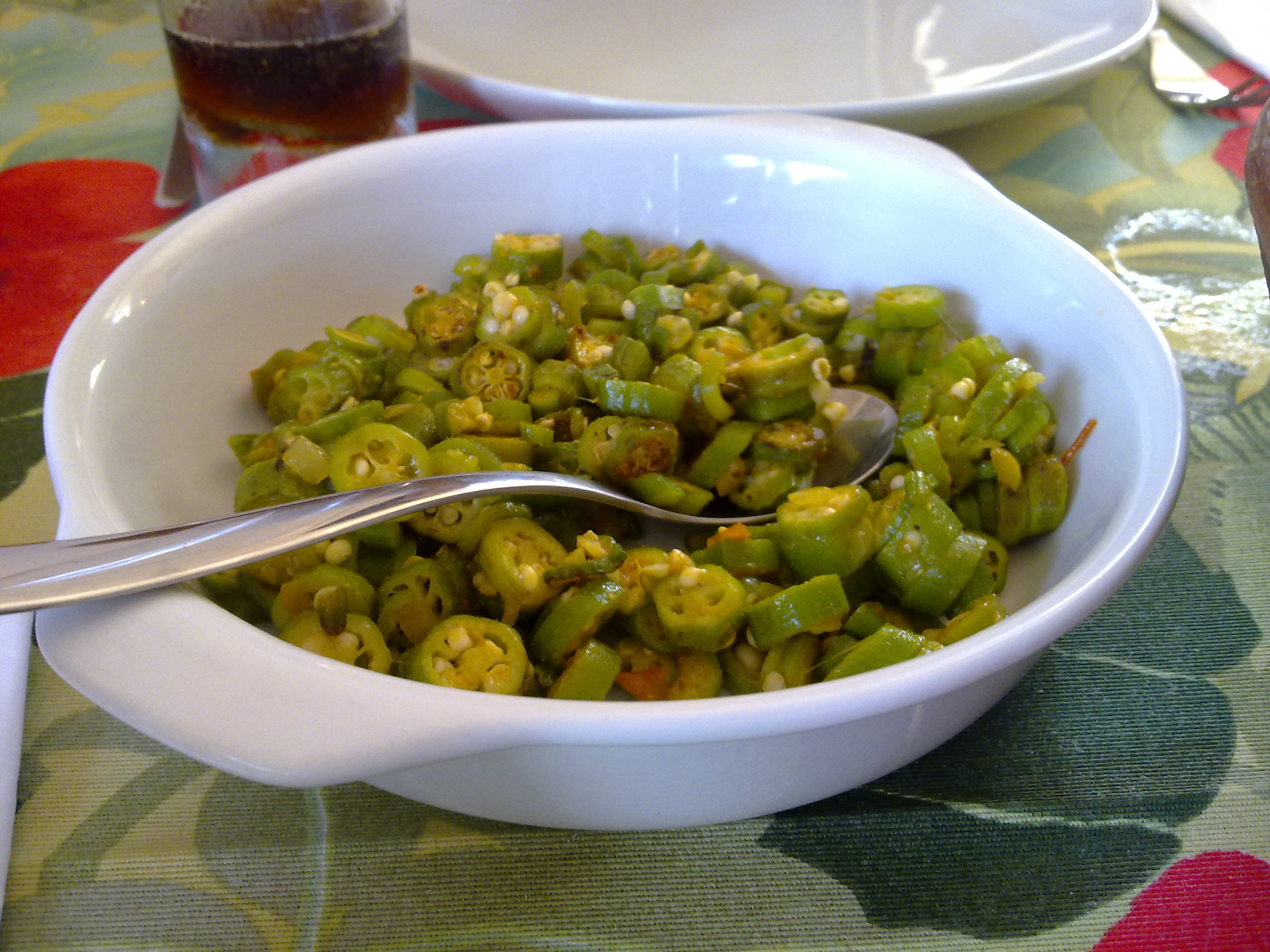 Caruru do restaurante Iaiá Bistrô, de Porto Alegre. Fica na rua Chavantes, 636, Vila Assunção.